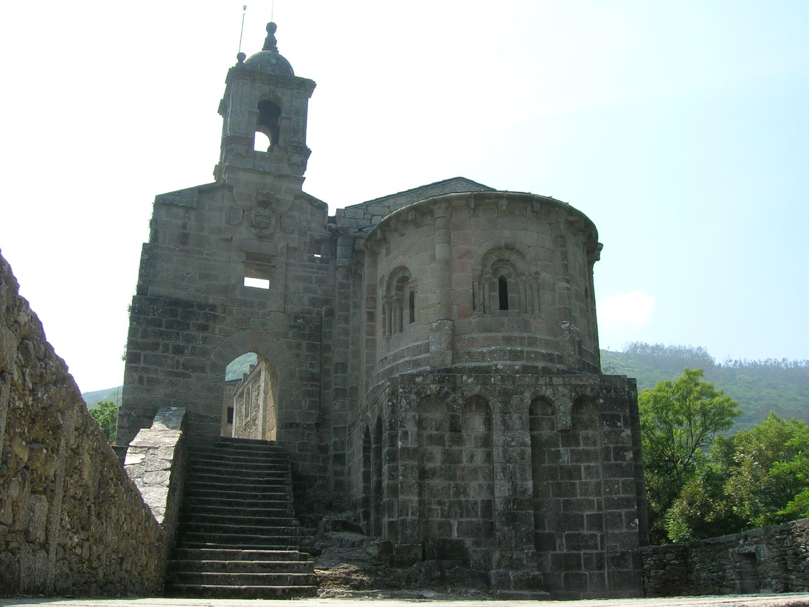 Mosteiro de San Xoán de Caaveiro (Parroquia:Capela (Santiago), concello da Capela, Comarca do Eume, Galicia - Spain'Monasterio de San Xoán de Caaveiro'